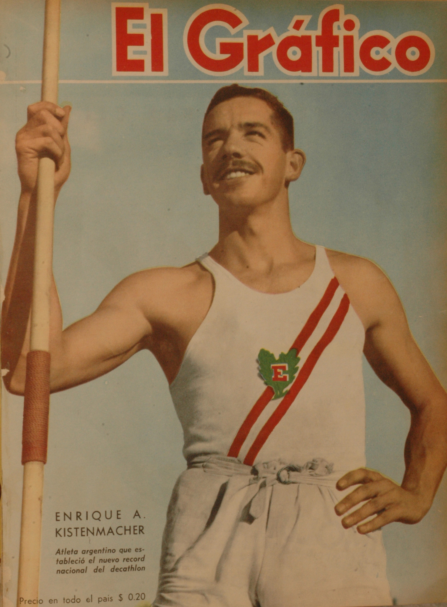 El Grafico del 25 de Abril de 1947. Edicion 1450